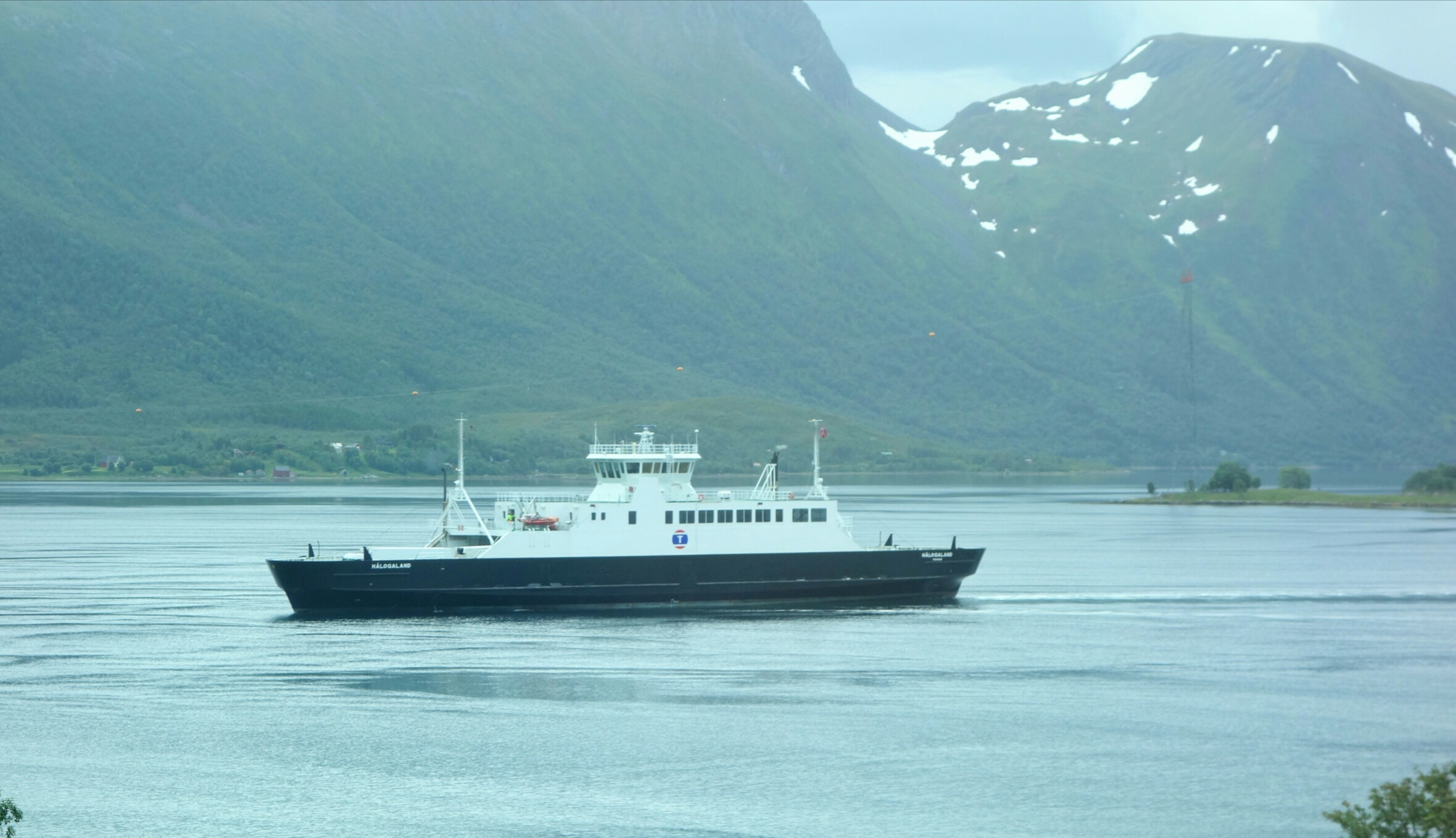 MF «Hålogaland» seiler inn til Refsnes fergekai, 17. juli 2017